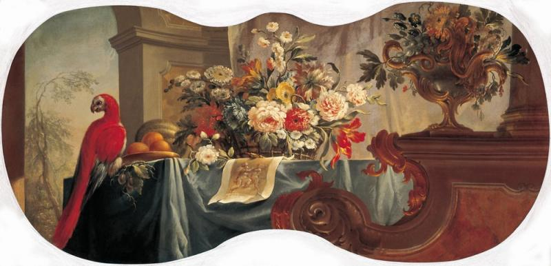 Десюдепорт с попугаем